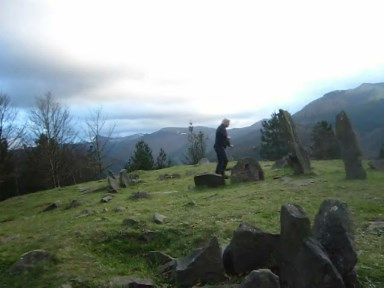 Hauts menhirs á Mulisko Gaina.